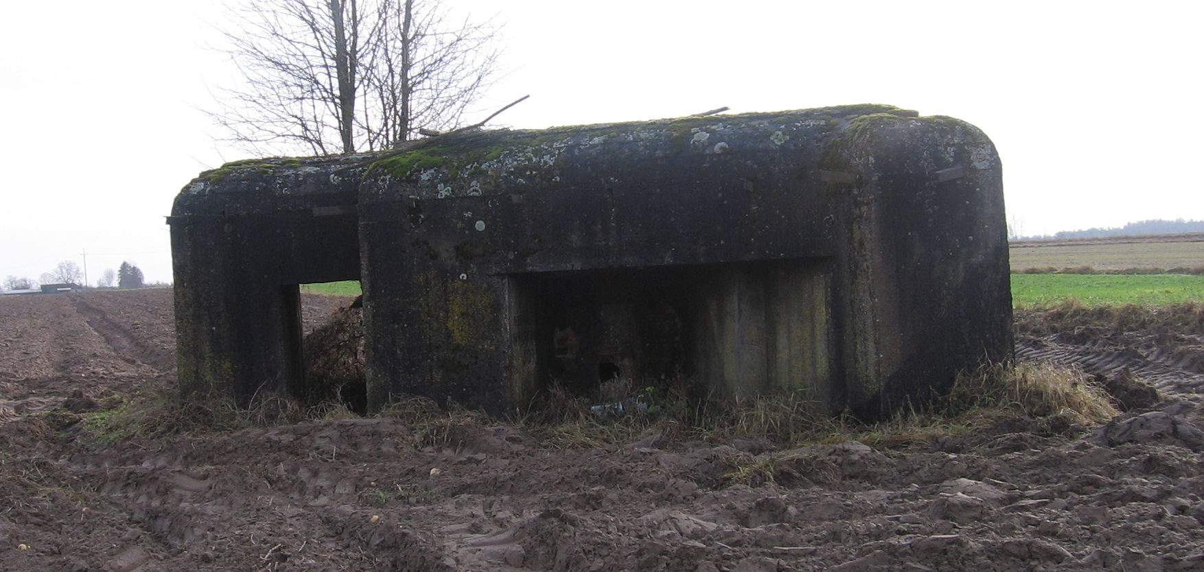 Bunkier zbudowany przez Rosjan w Adamowie (obecnie Kozarze)- 1940-1941